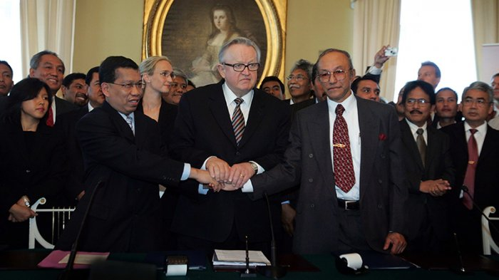 Penandatanganan Nota Kesepahaman antara RI dan GAM di Helsinki 2005.